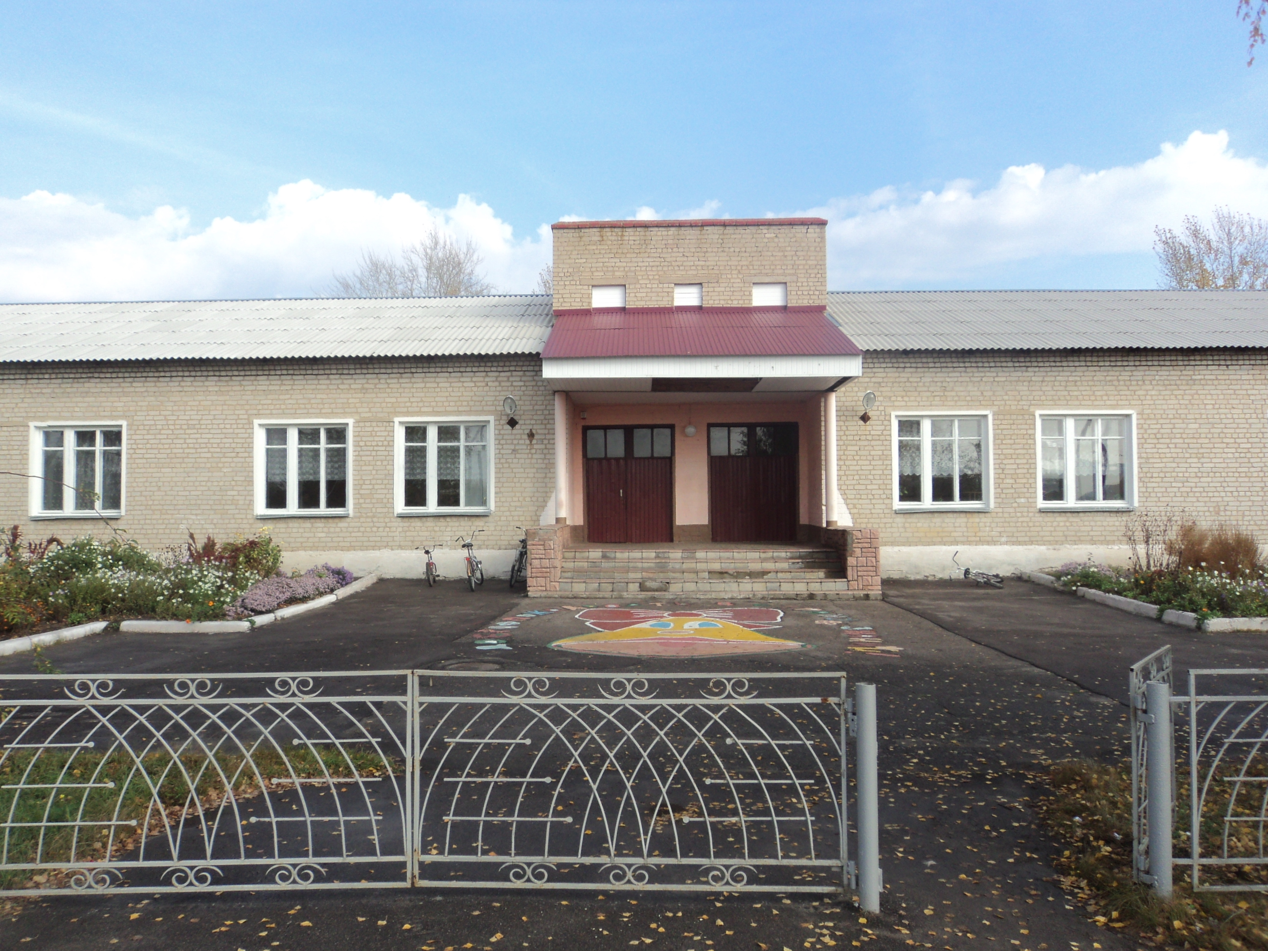 Школа в селе Бабка Воронежской области